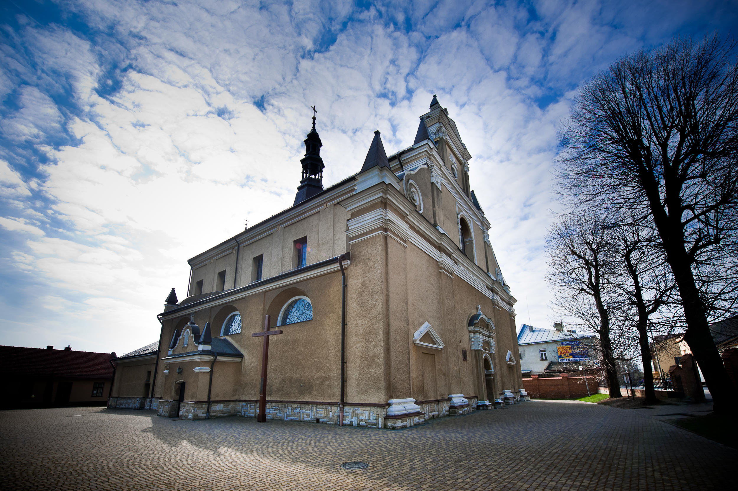 Radymno - kościół p.w. św. Wawrzyńca (zabytek nr rejestr. A-279)